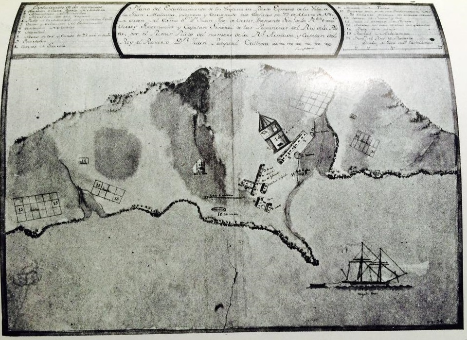 Panorama de Puerto Egmont [de la Cruzada] y la población, en 1780, durante la expedición de Callejas con el bergantín S.M. Rosario para incendiar y arrasar las edificaciones, refugio de piratas, balleneros y loberos.